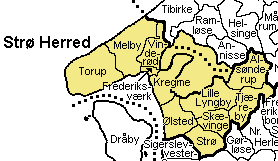 Strø Herred Frederiksborg Amt , Denmark. Map by Svend-Erik Christiansen, edited by user:Nico-dk .